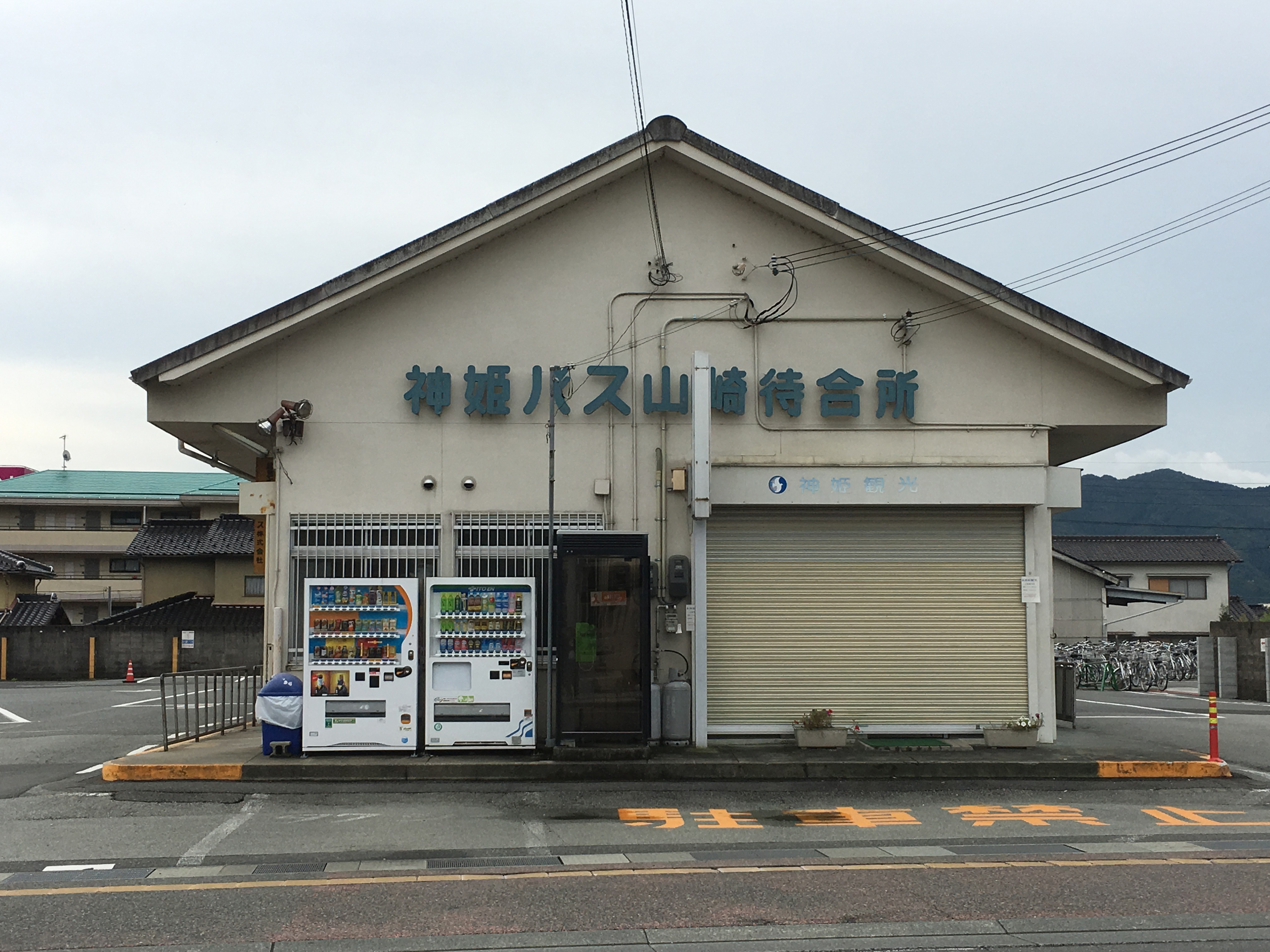 神姫バス山崎案内所（正面から撮影）